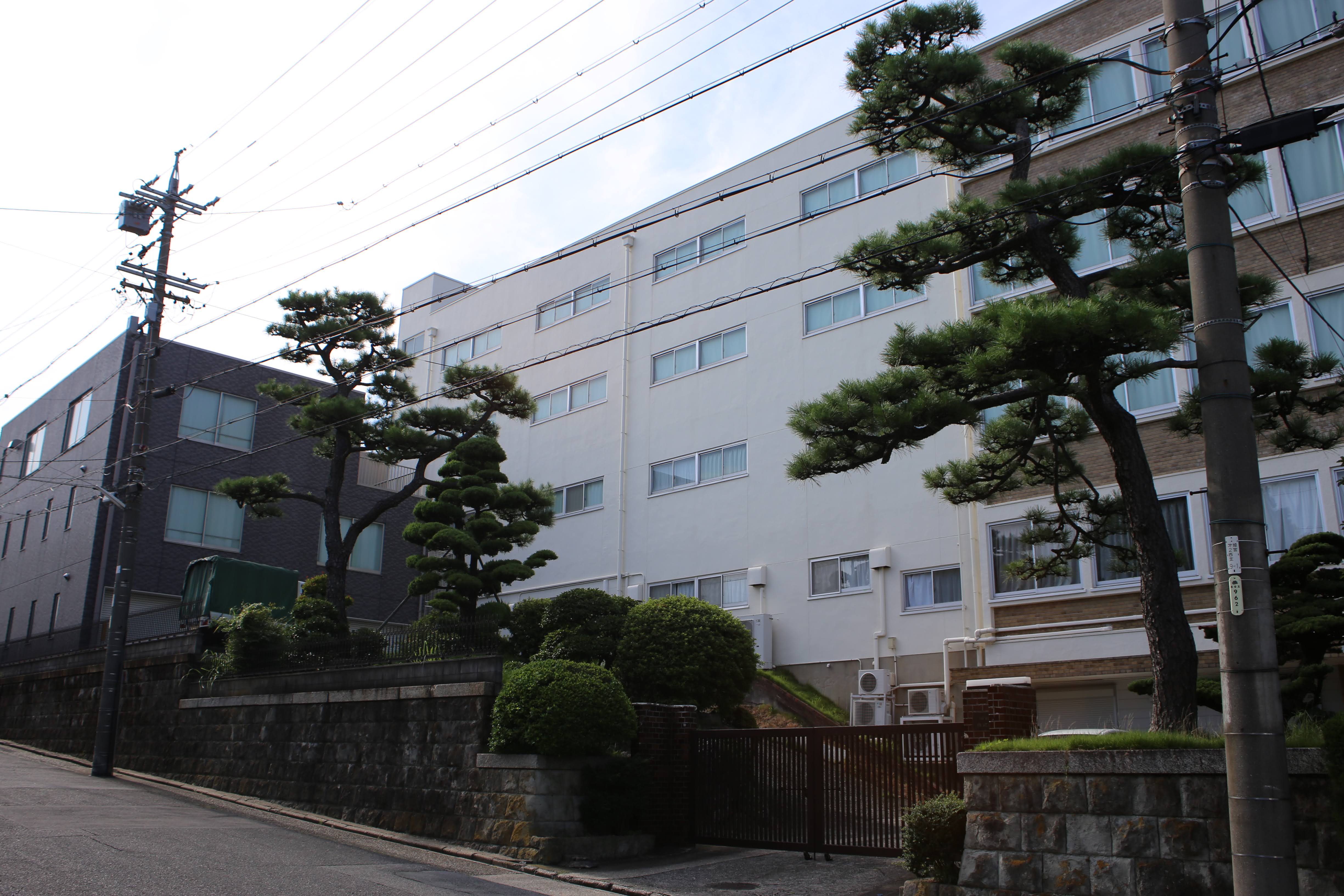 名古屋市瑞穂区鍵田町1丁目 横井定本社